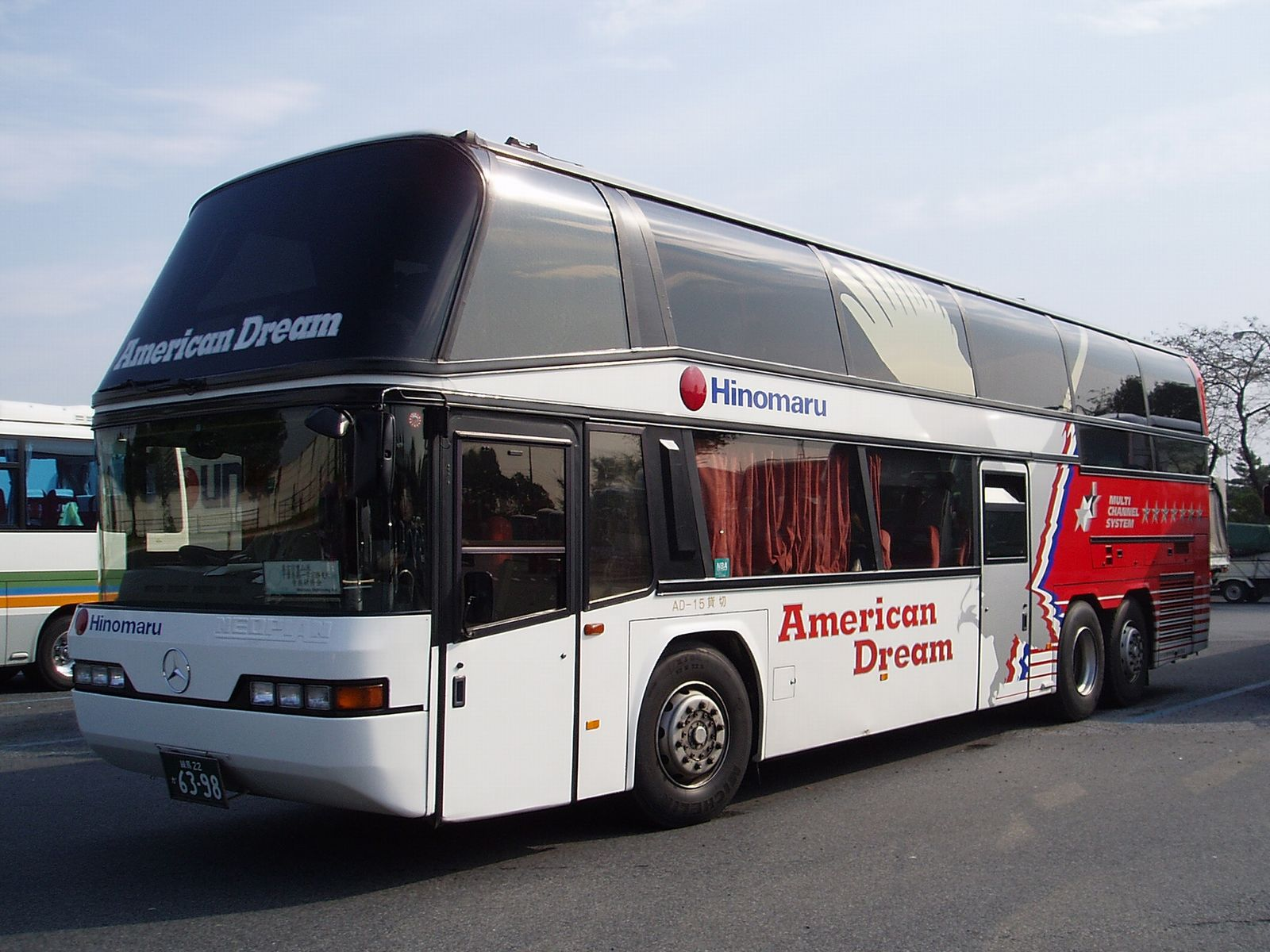 Hinomaru Jidousha Kougyou（日の丸自動車興業） NEOPLAN Skyliner N122/3 with Mercedes-Benz chassis, Japan-Version ネオプラン・スカイライナーN122/3 日本仕様車 日の丸自動車興業「アメリカンドリーム」AD-15 東北自動車道羽生パーキングエリアにて撮影 Photo by Cassiopeia_sweet.